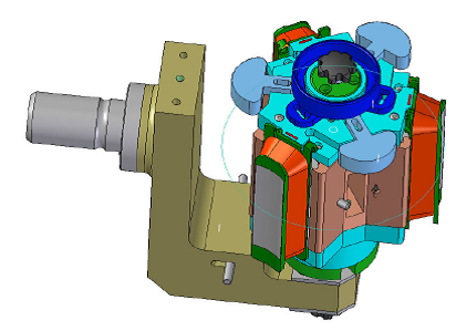 Wickelwerkzeug zur Verarbeitung von T-Segmenten als Polkette in einer Linearwickelmaschine